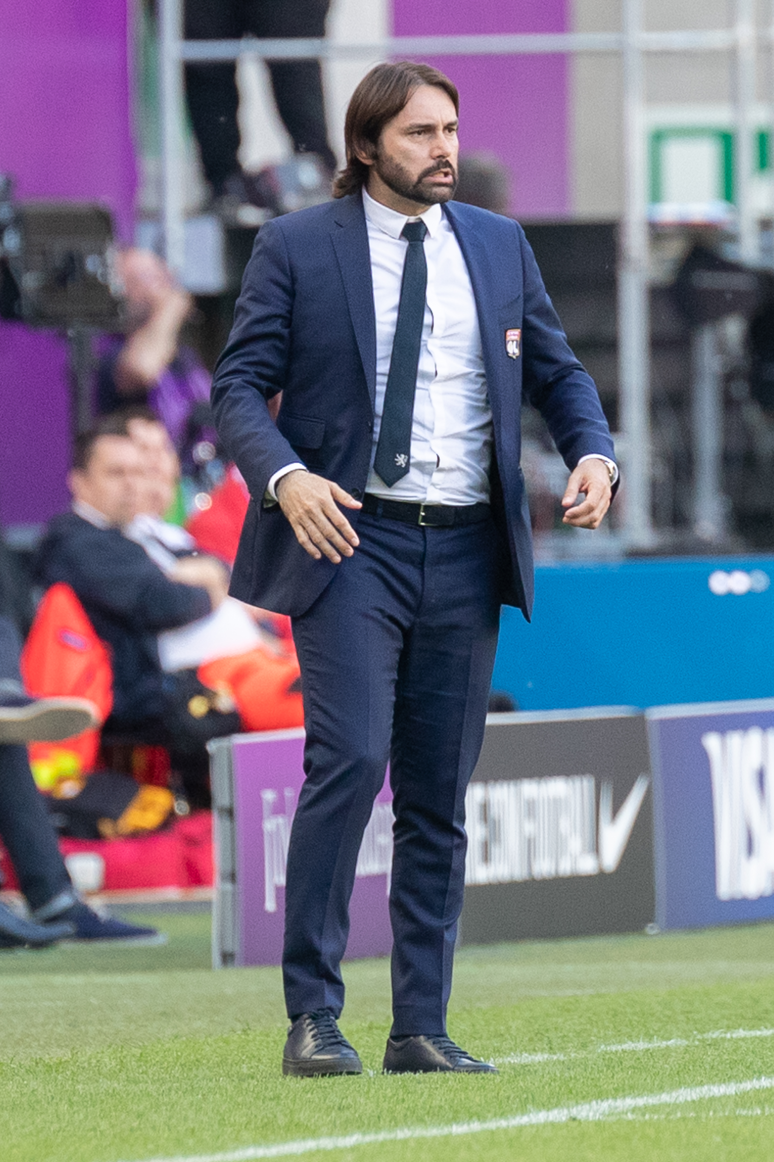 Fußball, Frauen, UEFA Women's Champions League, Olympique Lyonnais - FC Barcelona; Reynald Pedros (Olympique Lyon, Trainer, head coach); gestikulierend